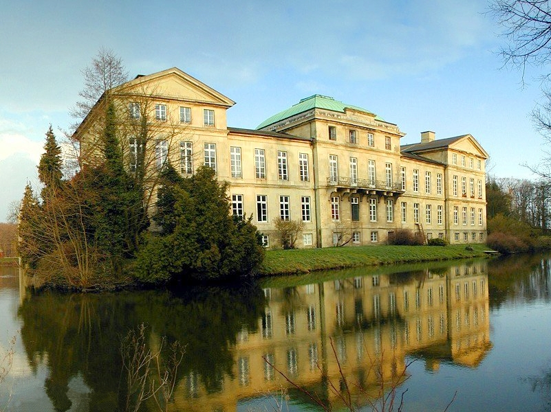 Schloss Stapel - Haupthaus - eines der schönsten Renaissanceschlösser im Münsterland